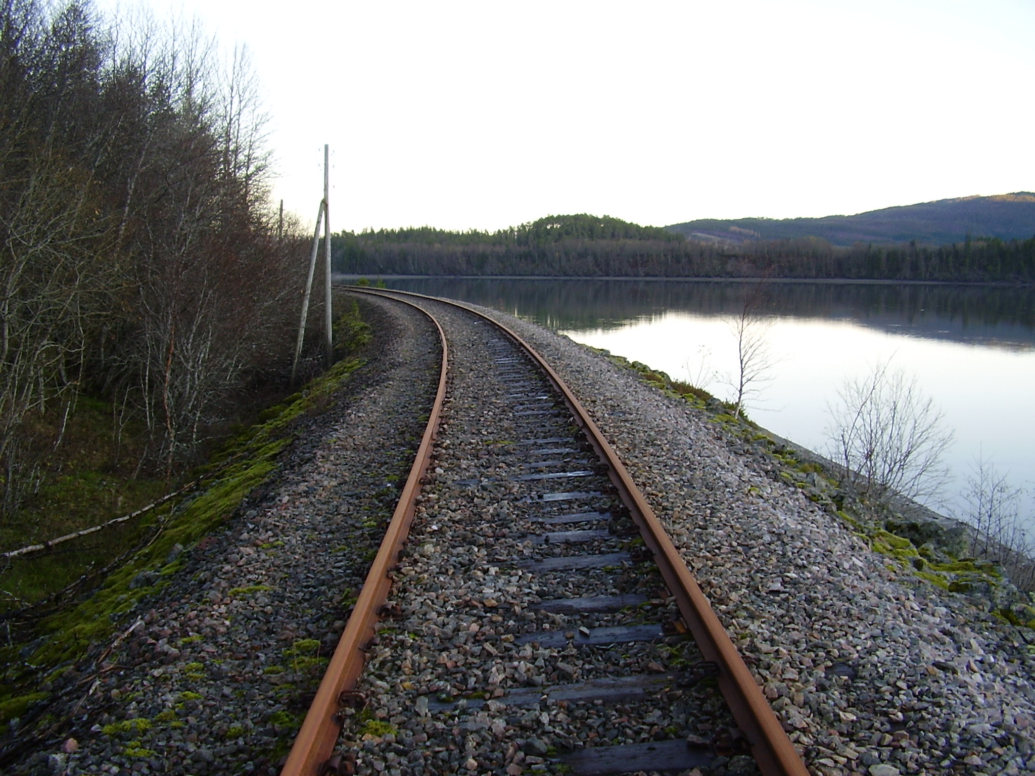 Die stillgelegte Bahnstrecke Namsos-Grong. Nedlagt namsosbanen. Abandoned railway line Namsosbanen.